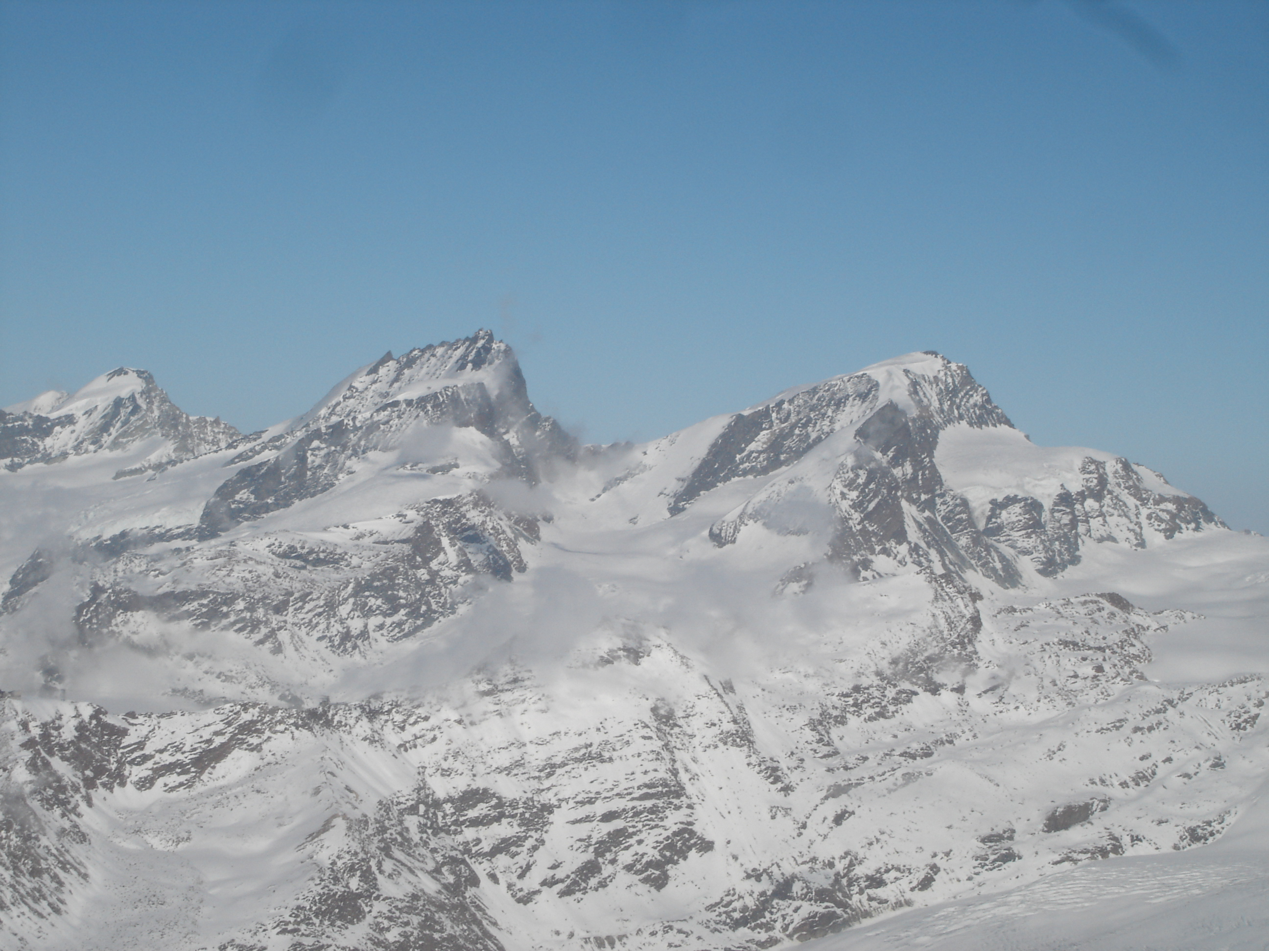 Allalinhorn, Rimpfischhorn und Strahlhorn (v.l.n.r.), in der Bildmitte der Adlerpass